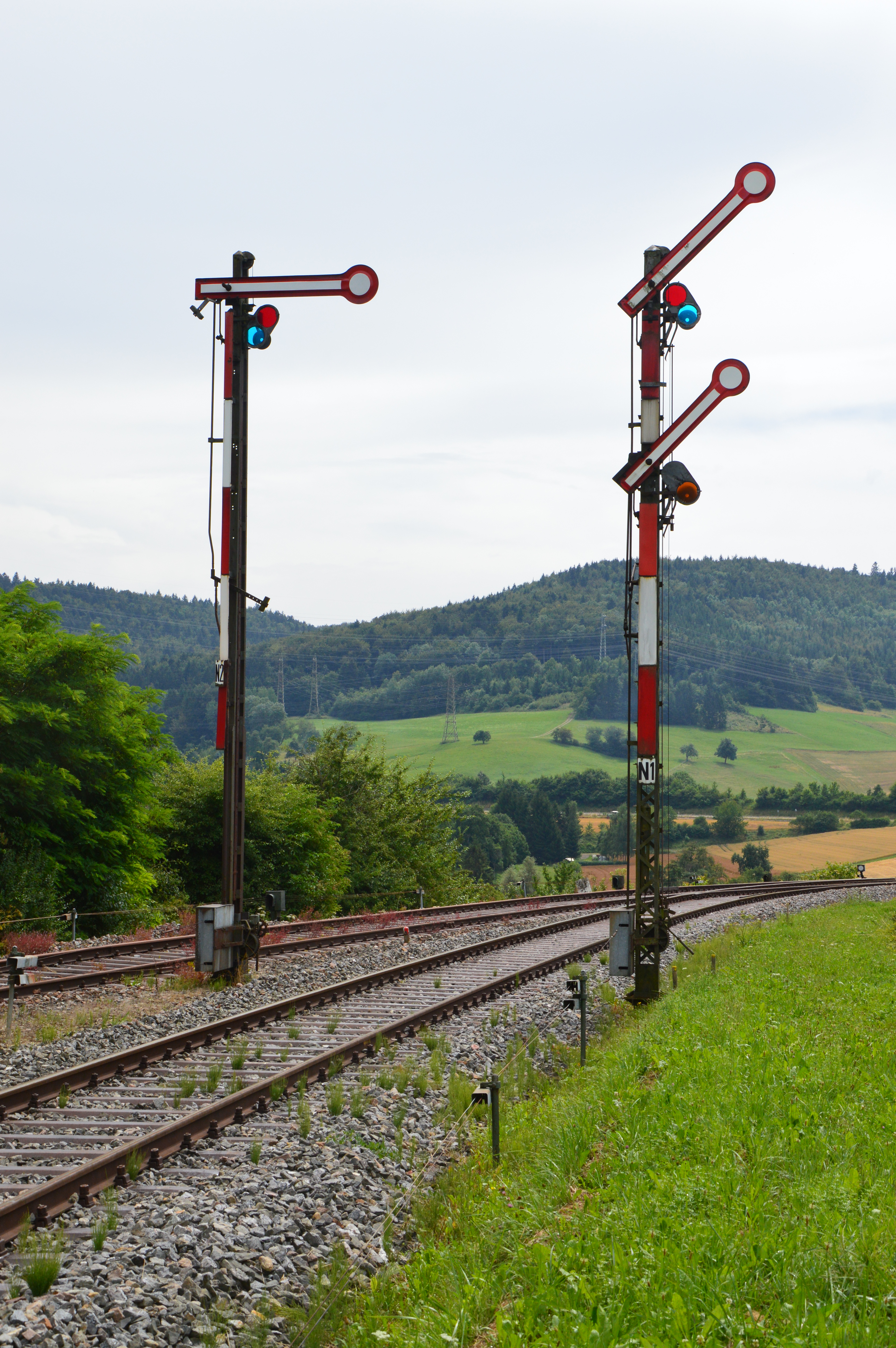 Beidi nördlichi Uusfaarsignaal vom Baanhof Grimmelzofè ( ? Epfenhofen ? ) a dè Sauschwänzlebaan.